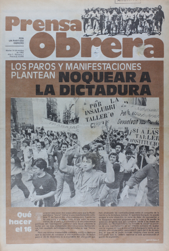 Primera plana del número 1 del periódico Prensa Obrera editado el 14 de diciembre de 1982